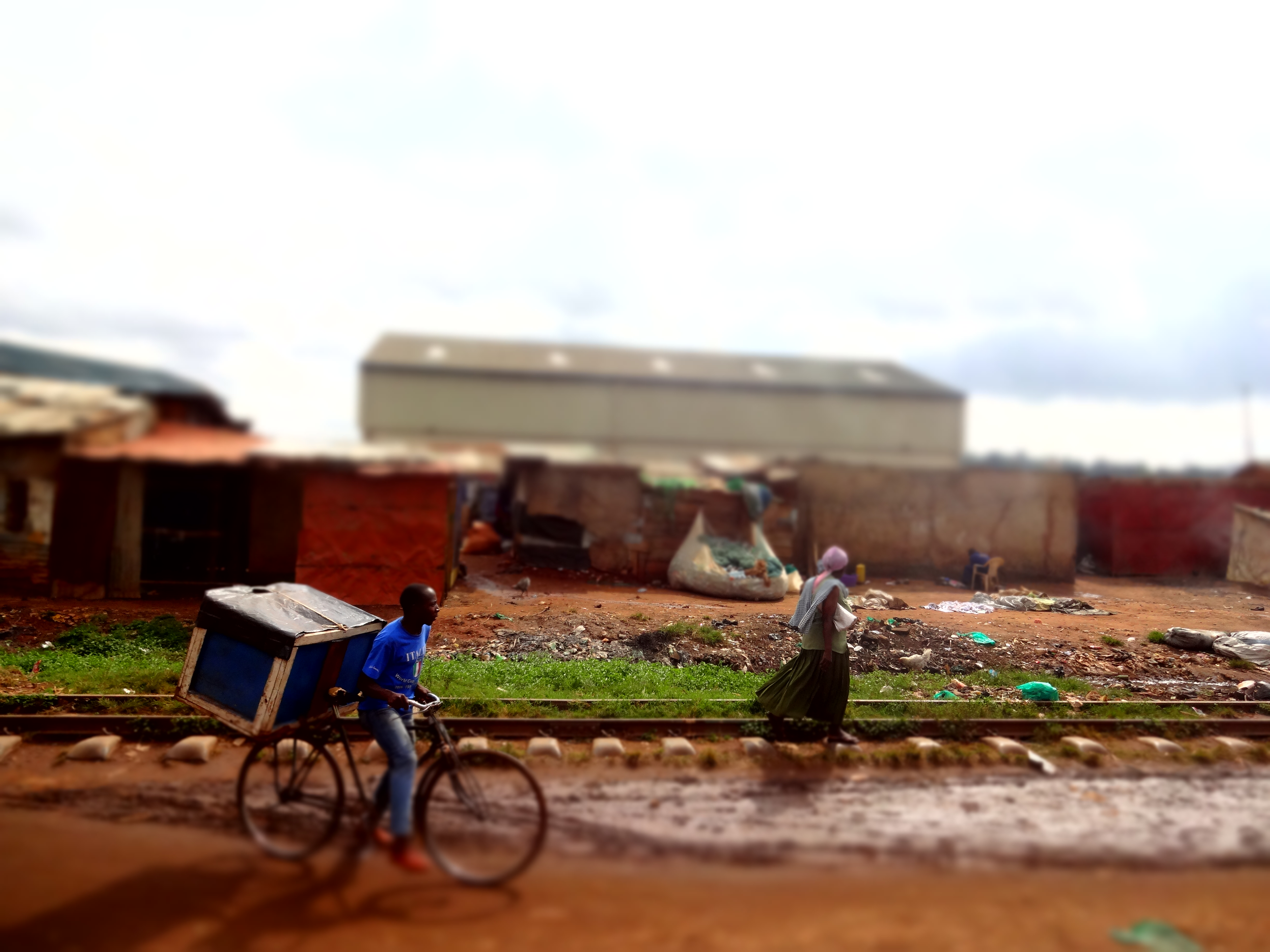 שכונת עוני לצד המסילה הישנה